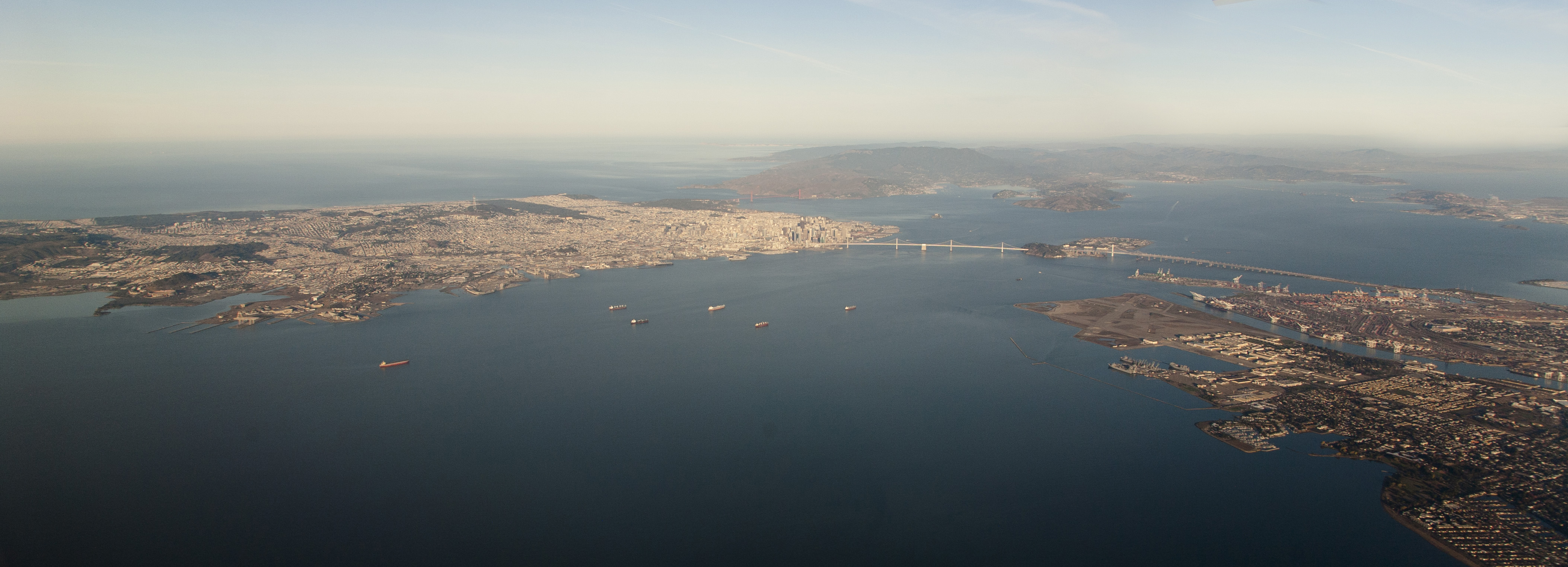 2014_11_05 San Francisco on departure from SFO